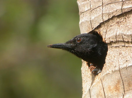 Pic de la Guadeloupe (Melanerpes herminieri) à l'entrée de son nid